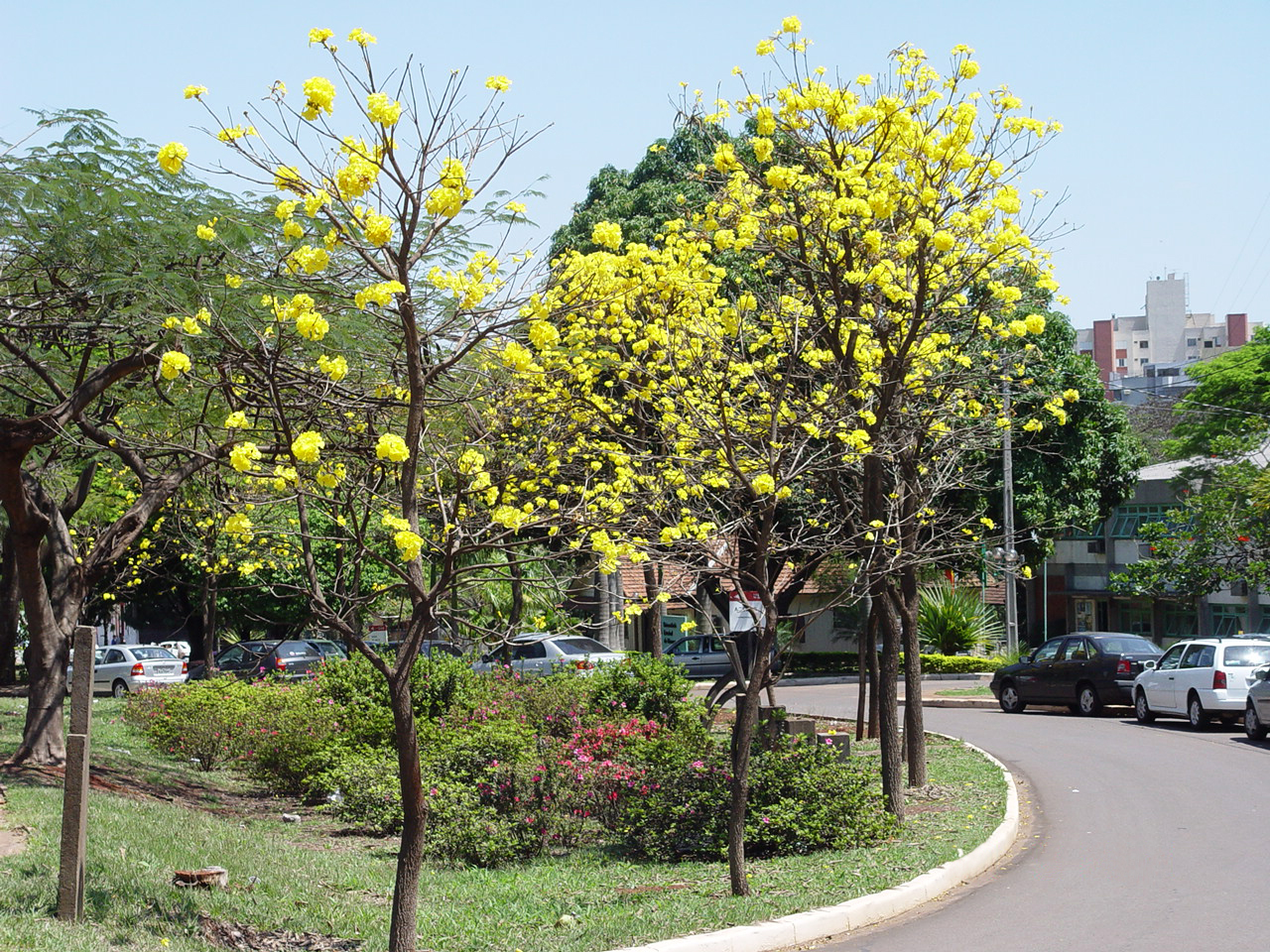 Florada do Ipê Amarelo na Universidade Estadual do Maringá (UEM)